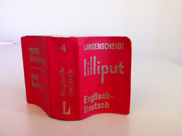 Langenscheidt Lilliput Englisch 1964